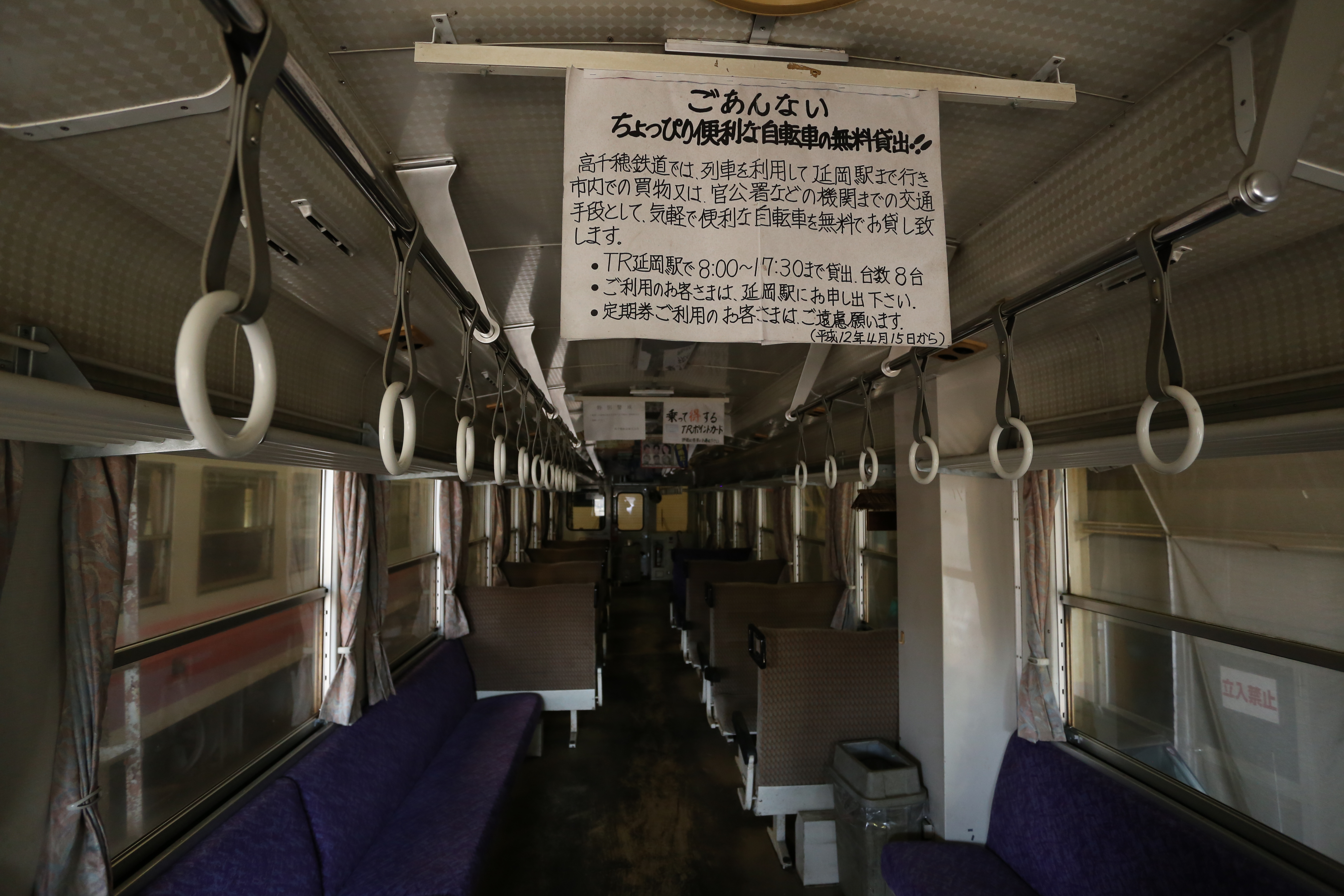 高千穗駅